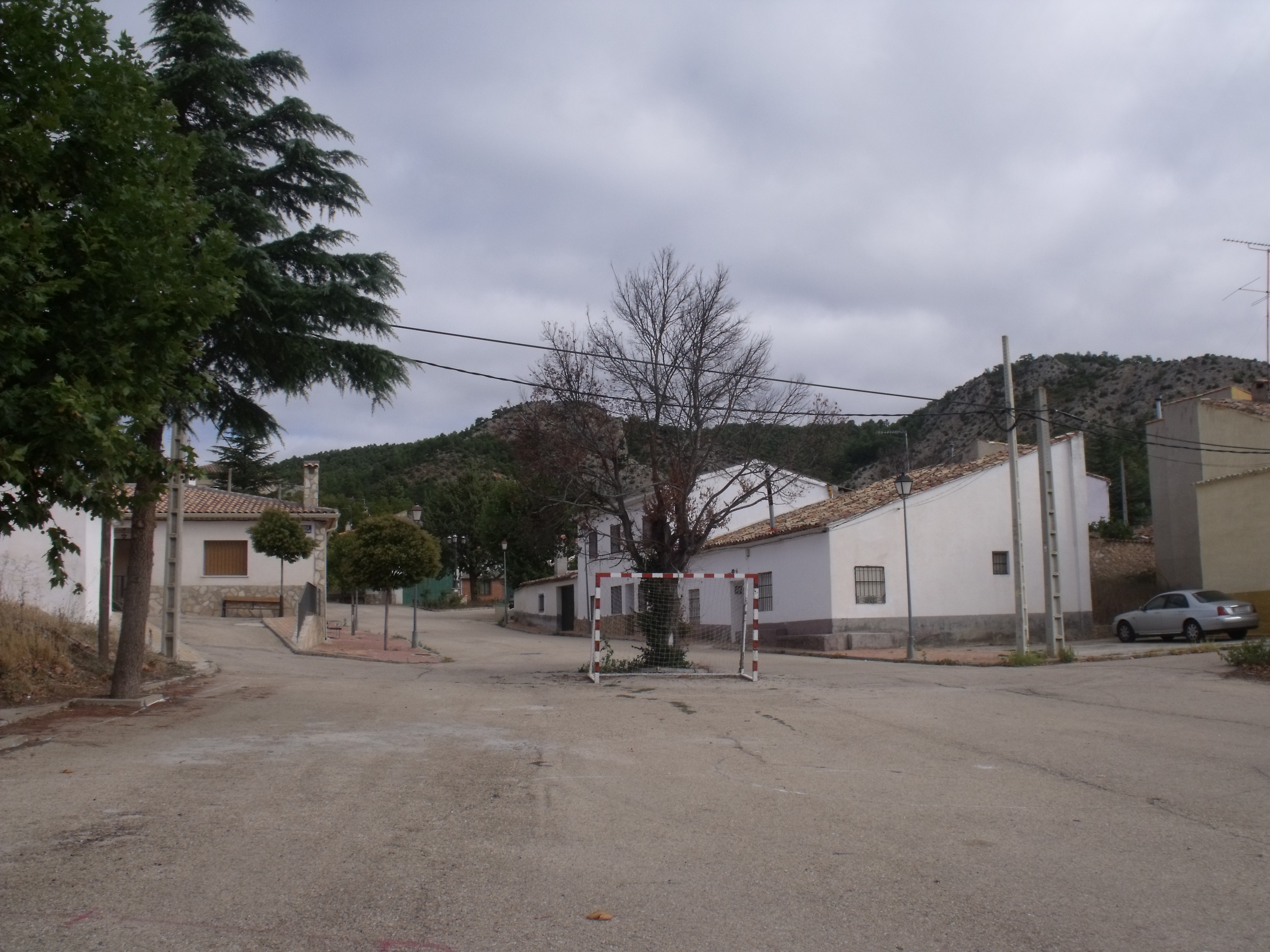 Bascuñana de San Pedro